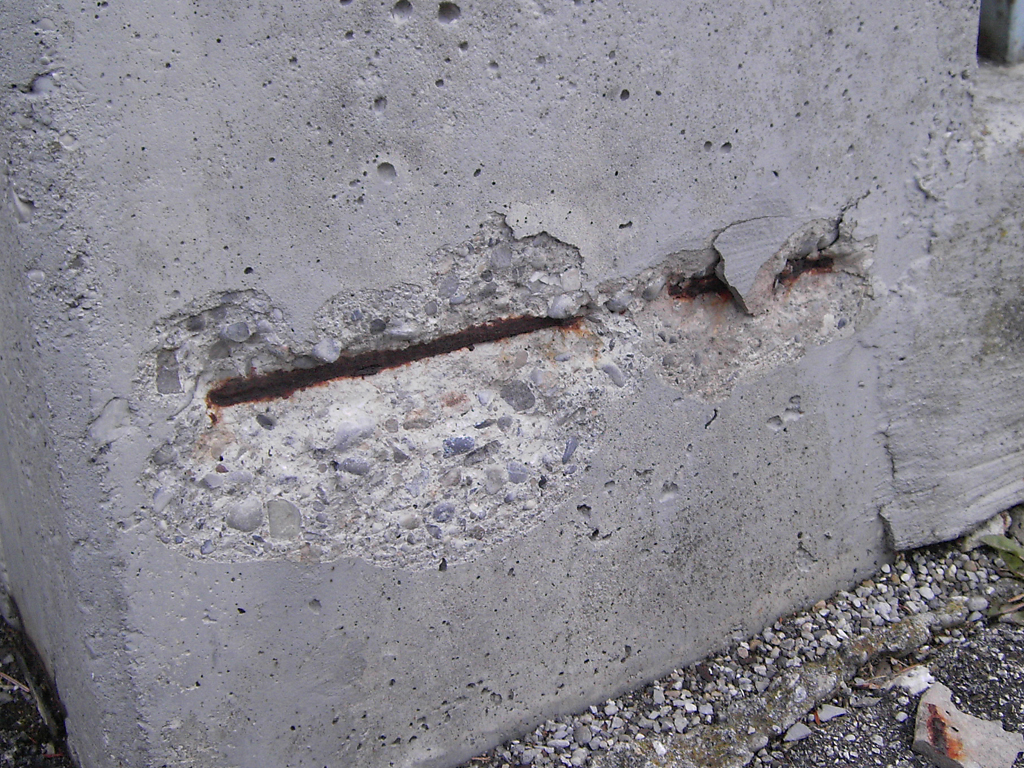 Betonkorrosion